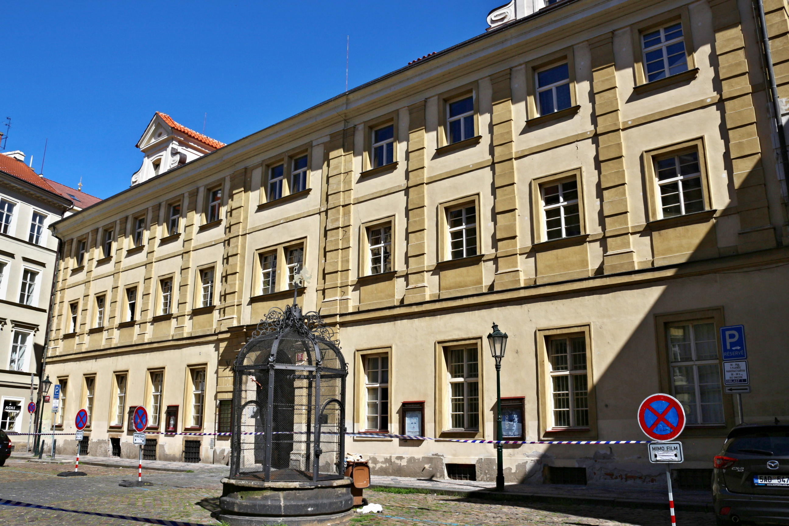 Anenské námětí